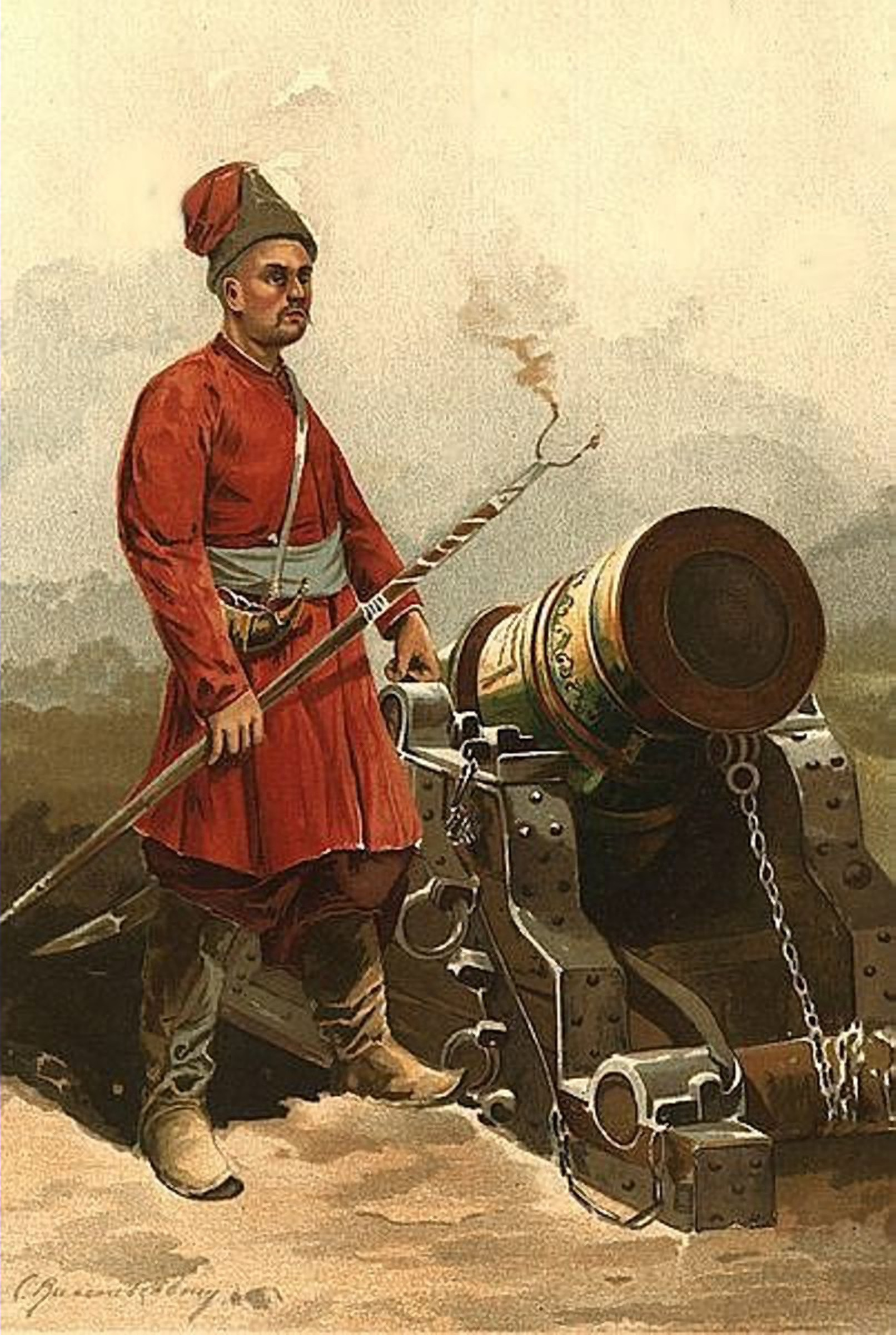 Гармаш часів гетьмана І.Мазепи; при ньому мортира, вилита за наказом Мазепи (Артилерійський музей в Петербурзі) Cossack mortar during Ivan Mazepa rule (18 c) Акварель. 1900 р.